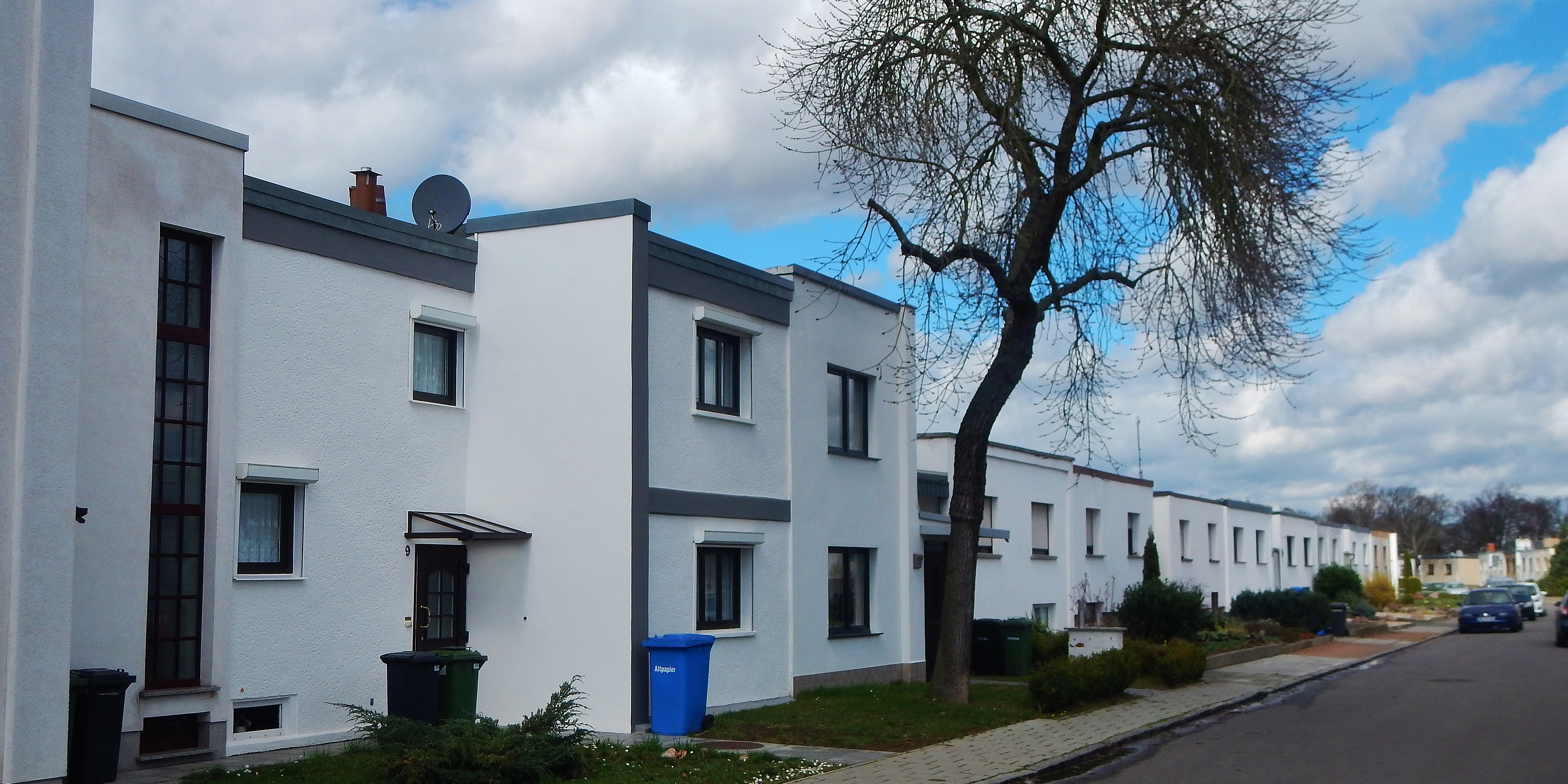 Häuser aus der Bauhaus-Zeit in Dessau-Törten, Mittelring